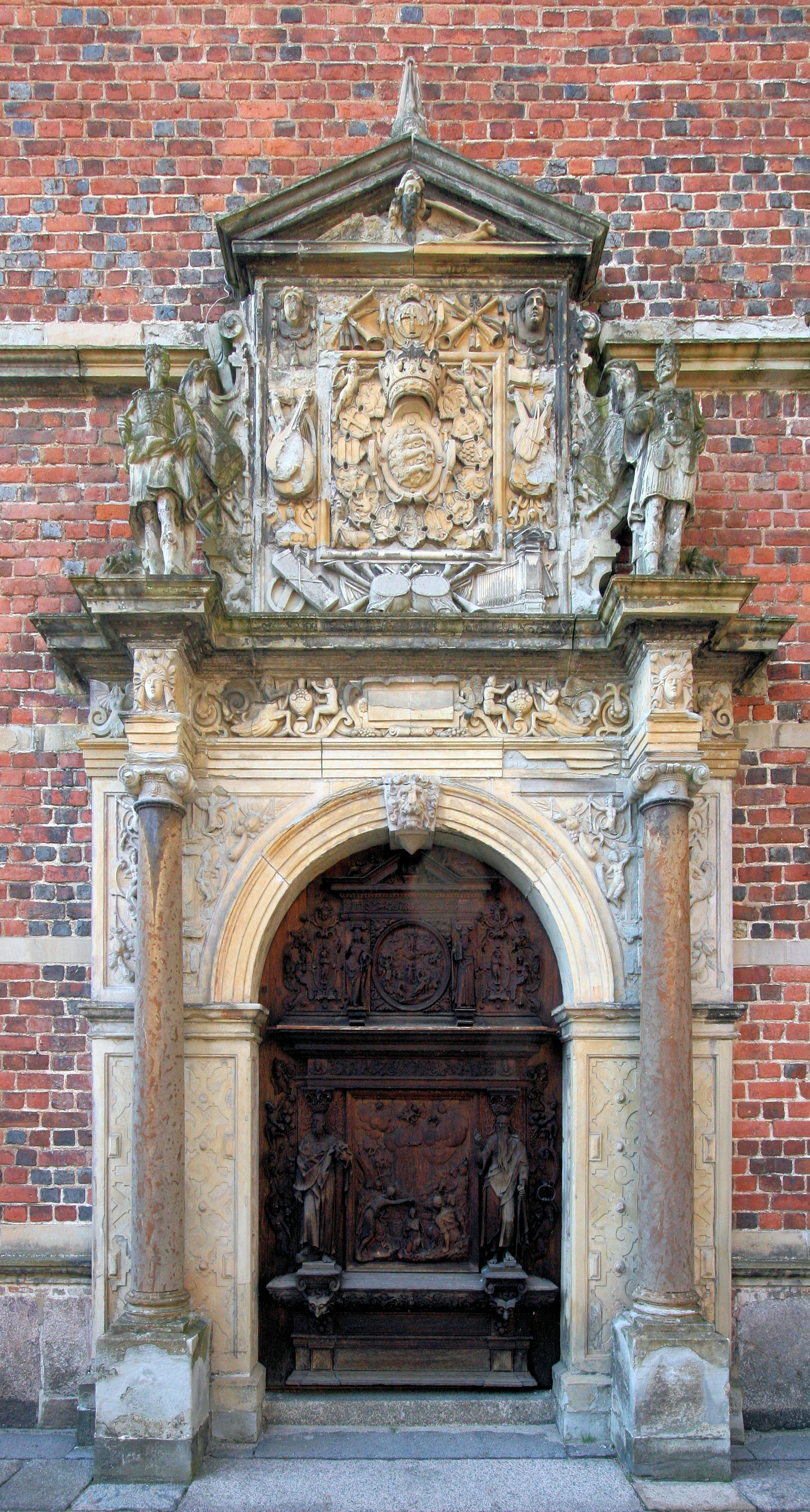 Frederiksborg Slotkirke, Hillerød, Denmark. Portal in the church wing